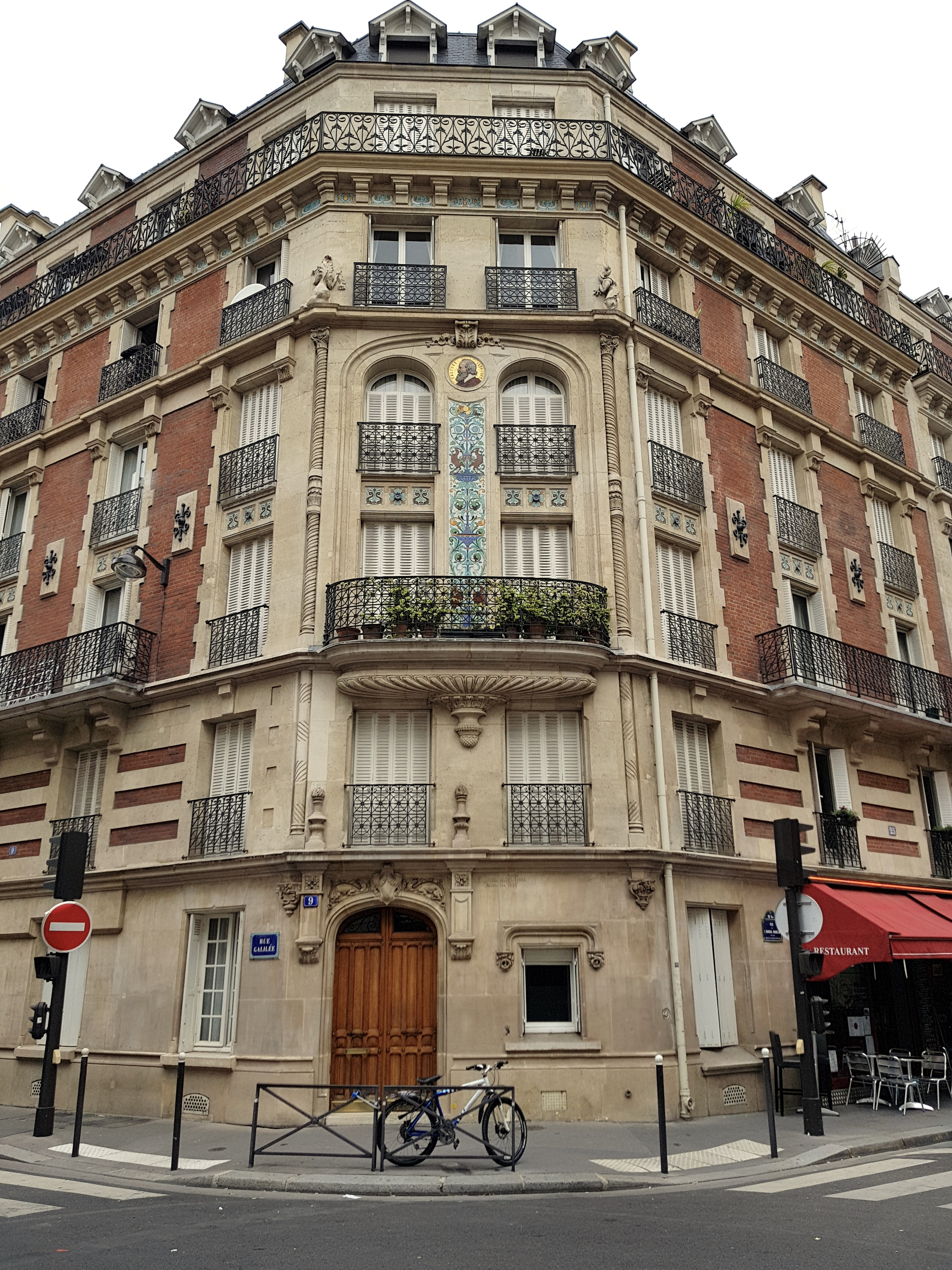 Immeuble d'angle n° 9, rue Galilée / n° 27, rue de l'Amiral-Hamelin, Paris 16e, édifié en 1883 par l'architecte Henri Fivaz.